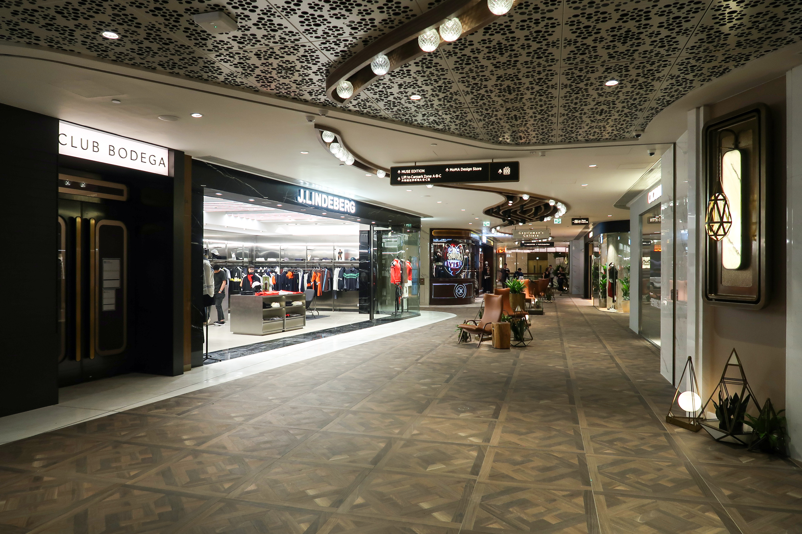 K11 MUSEA Level 1